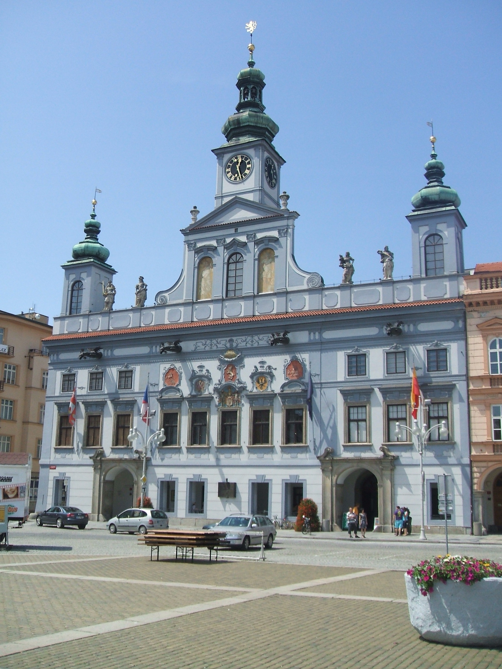 Radnice v Českých Budějovicích